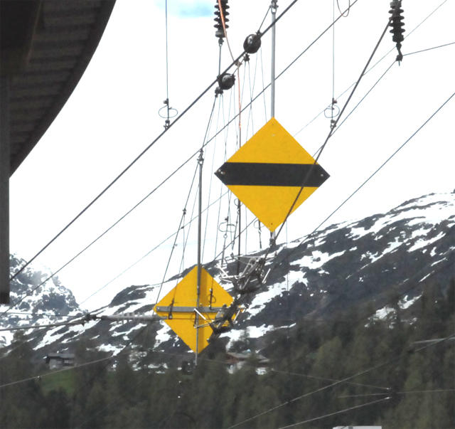 De spanningssluis te Sankt Moritz op 3 juni 2010. Dit is de scheiding tussen het wisselstroom net en het gelijkstroom net.